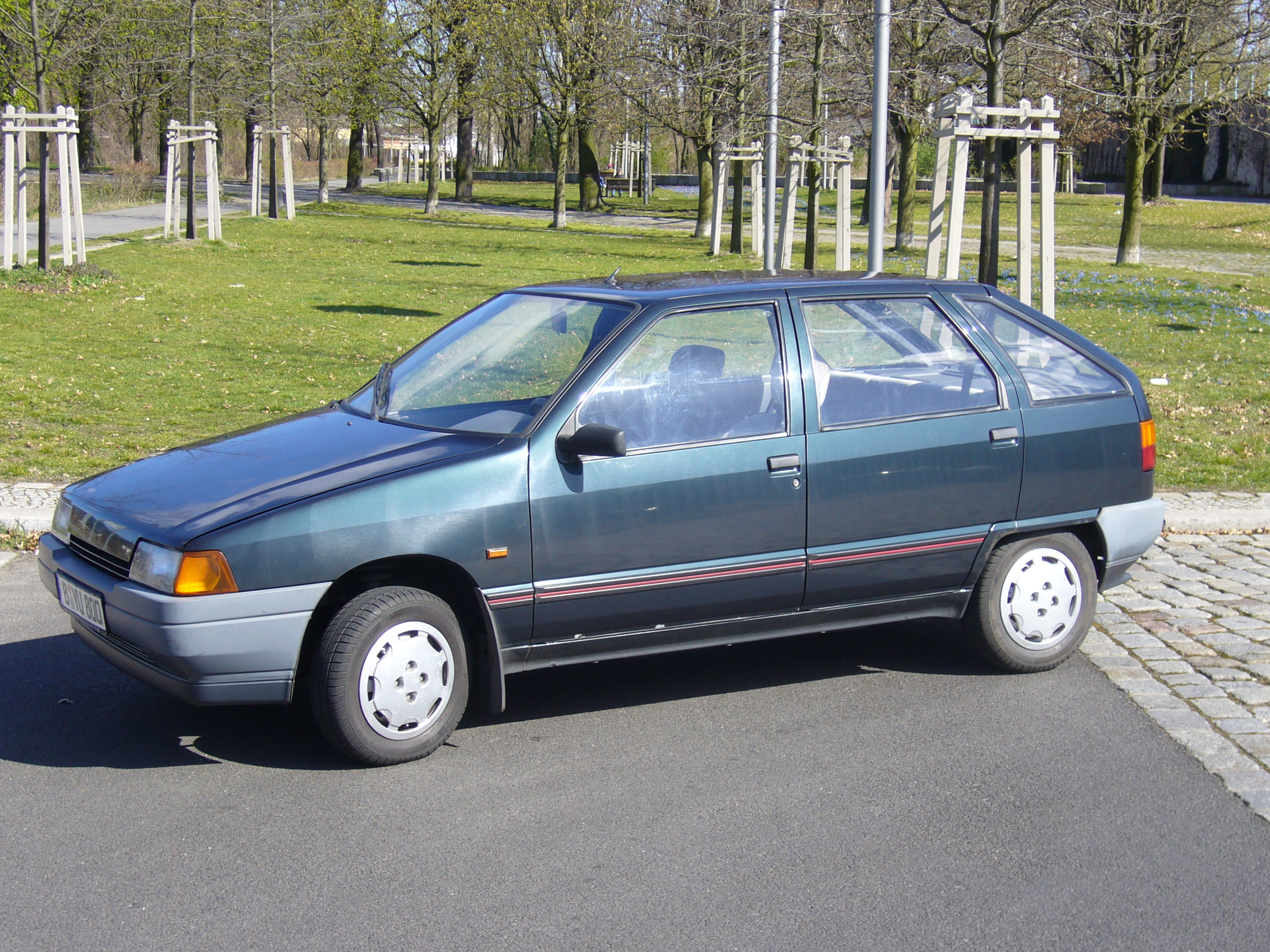 1991 Yugo Florida 1.3 EFI